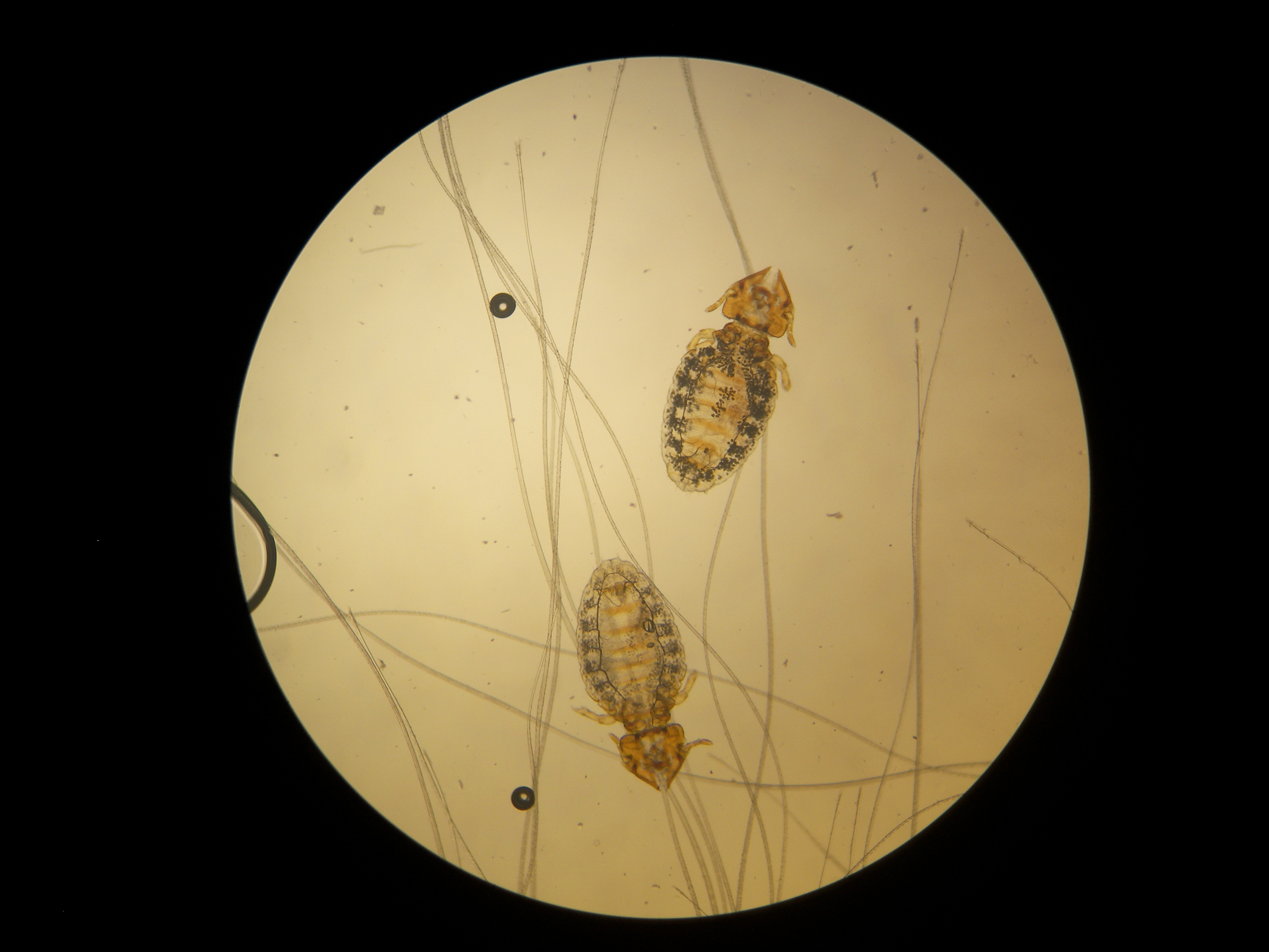 Pou broyeur du chat x100